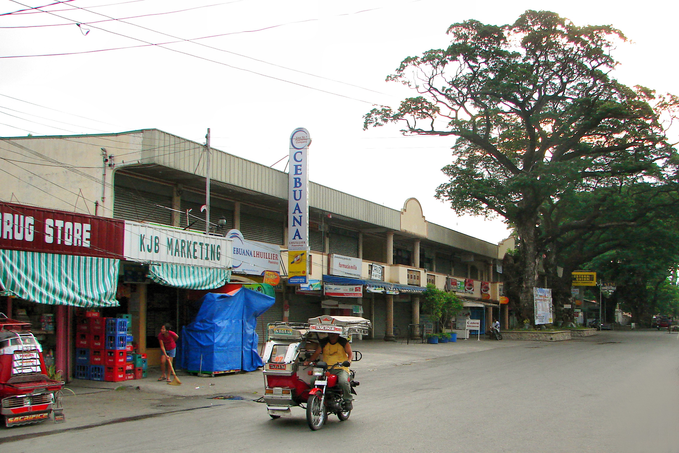 Pozorrubio, Pangasinan, Philippines